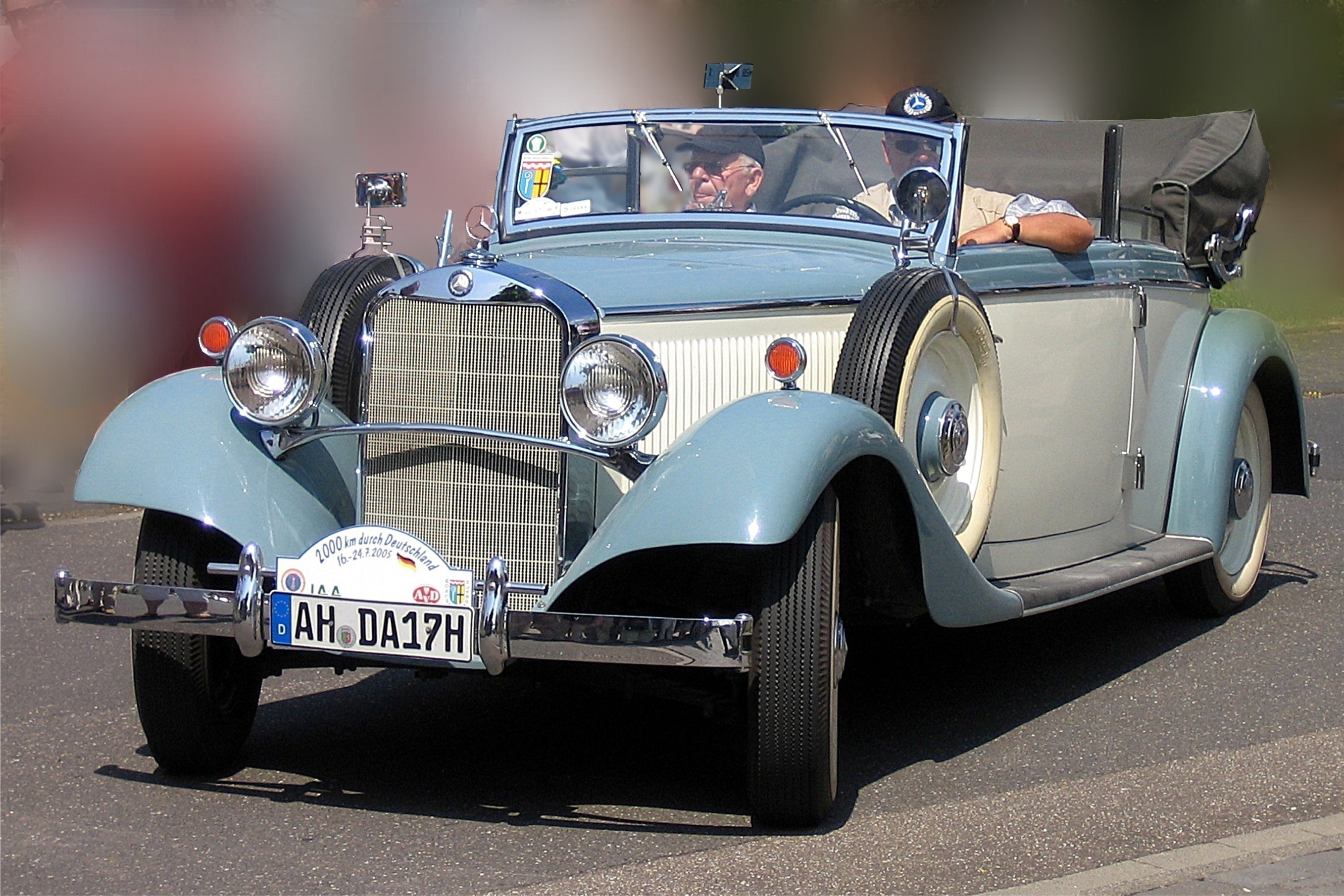 Mercedes-Benz 200, Baujahr 1935, bei 2000 km durch Deutschland 2005 (Phantasiekennzeichen).